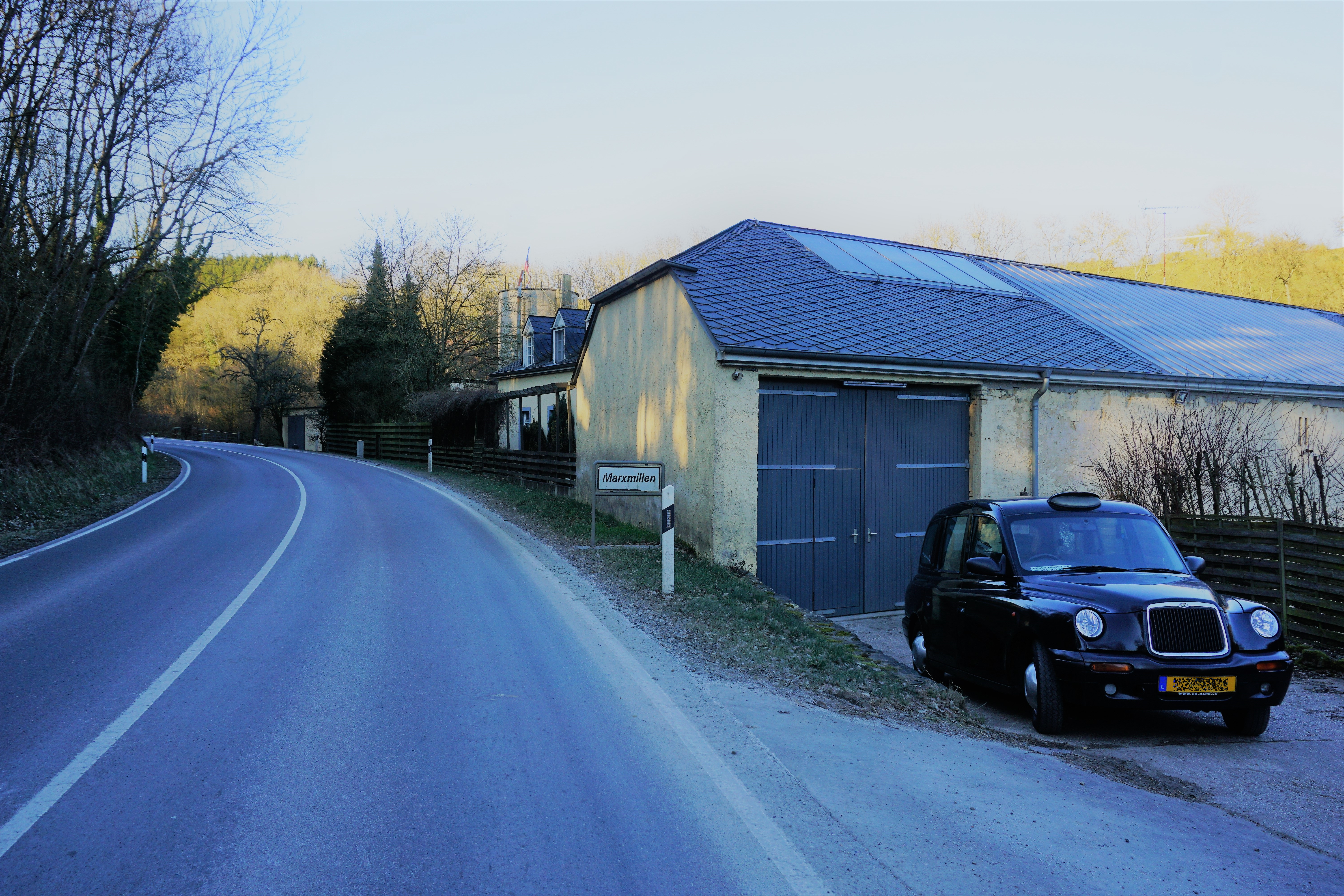 Marxmillen, commune de Biwer.